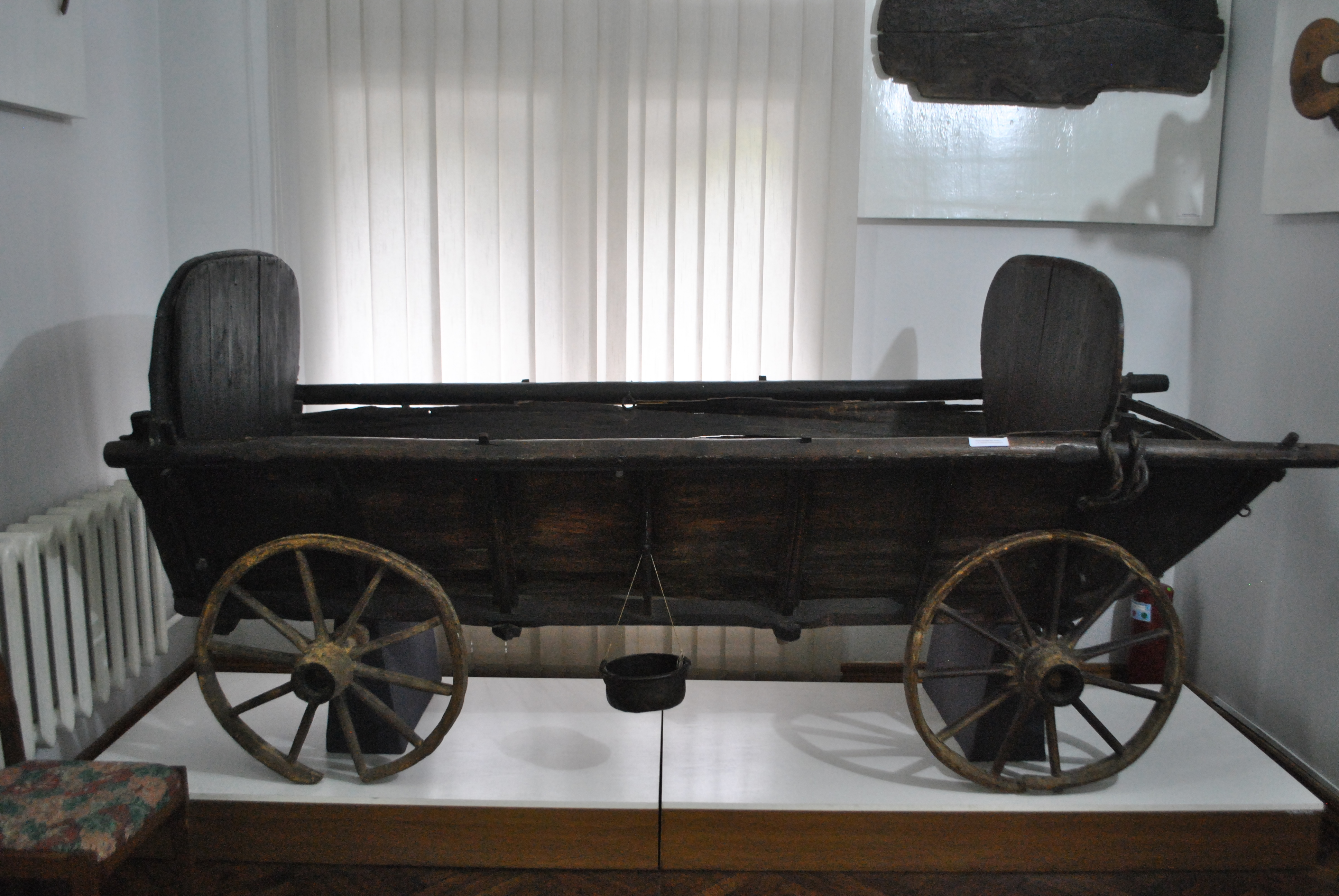 Chumak's cart XVIII century